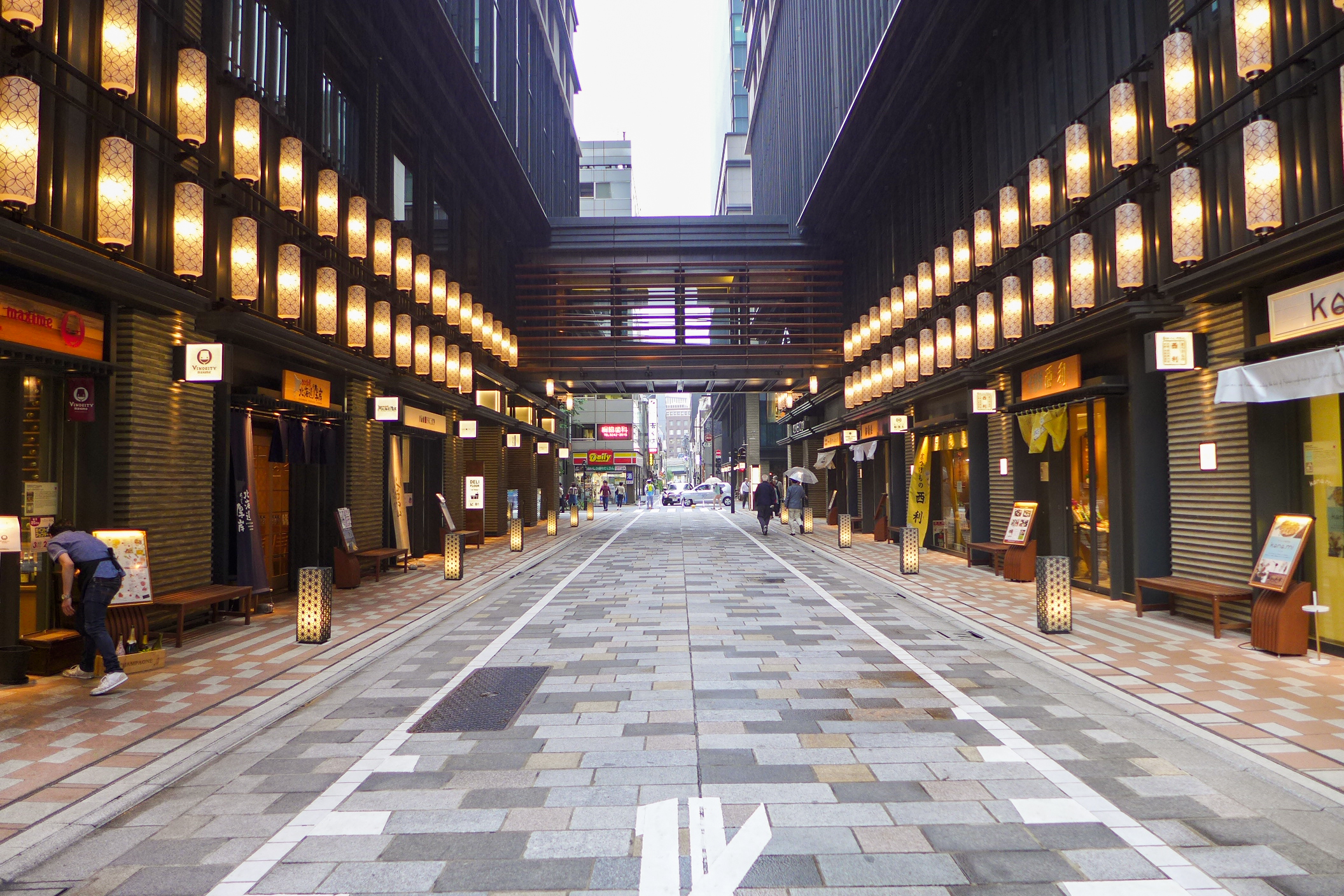 Coredo Muromachi 1 & 2 walkway